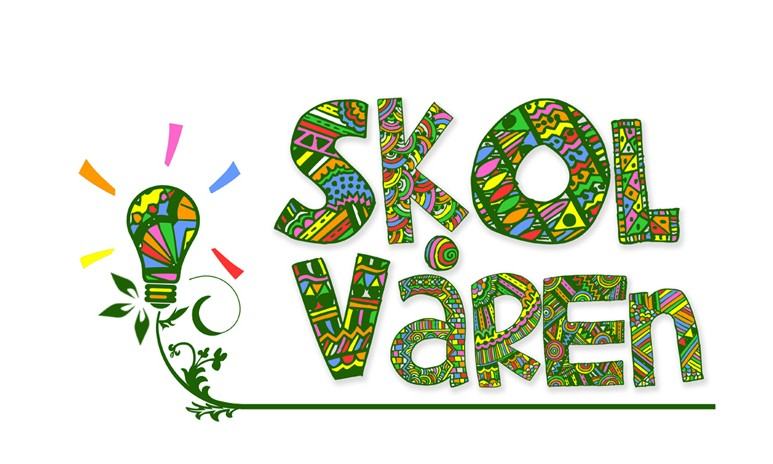 Logga för skolvåren